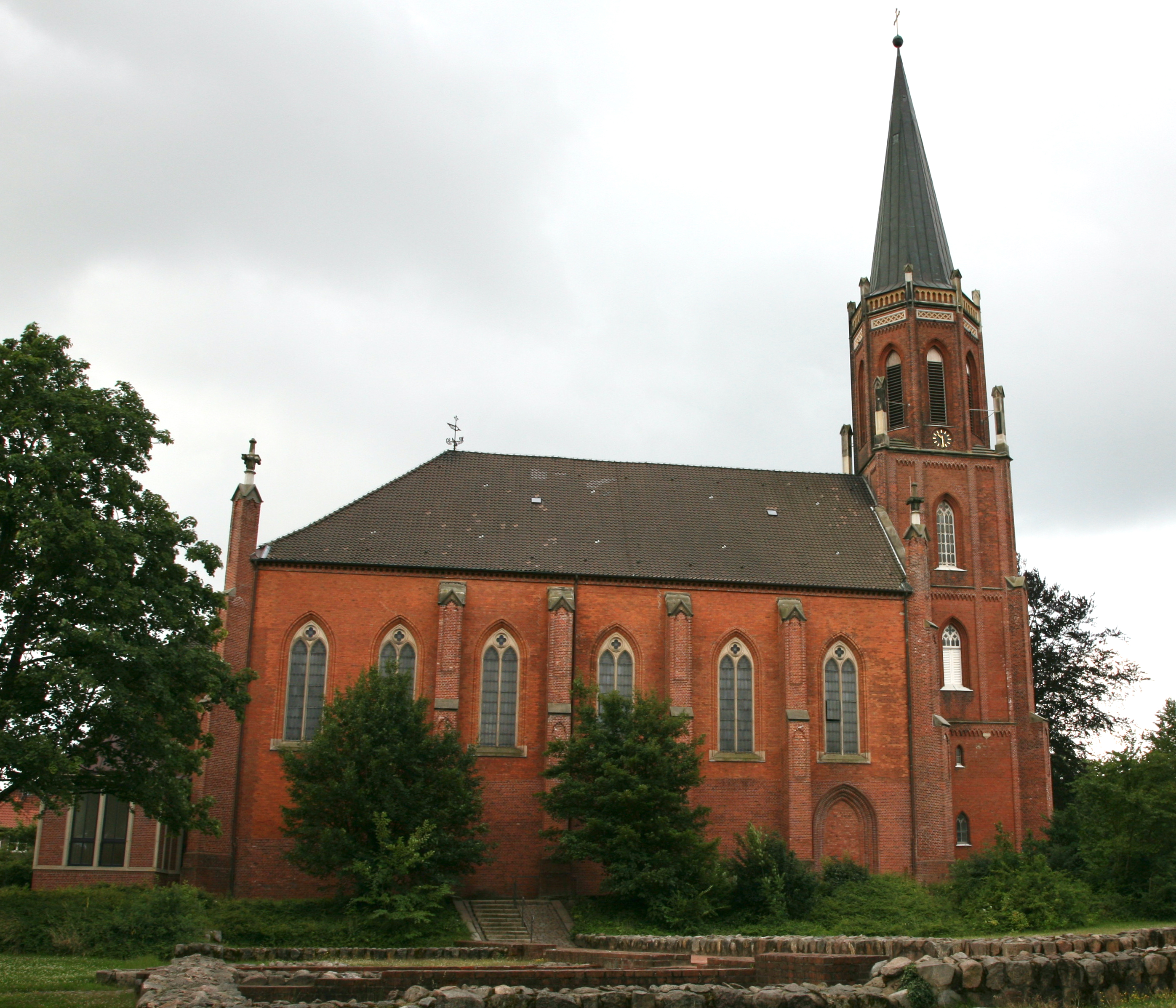 The church St. Marien und Bartholomäi in Harsefeld in Landkreis Stade, Niedersachsen